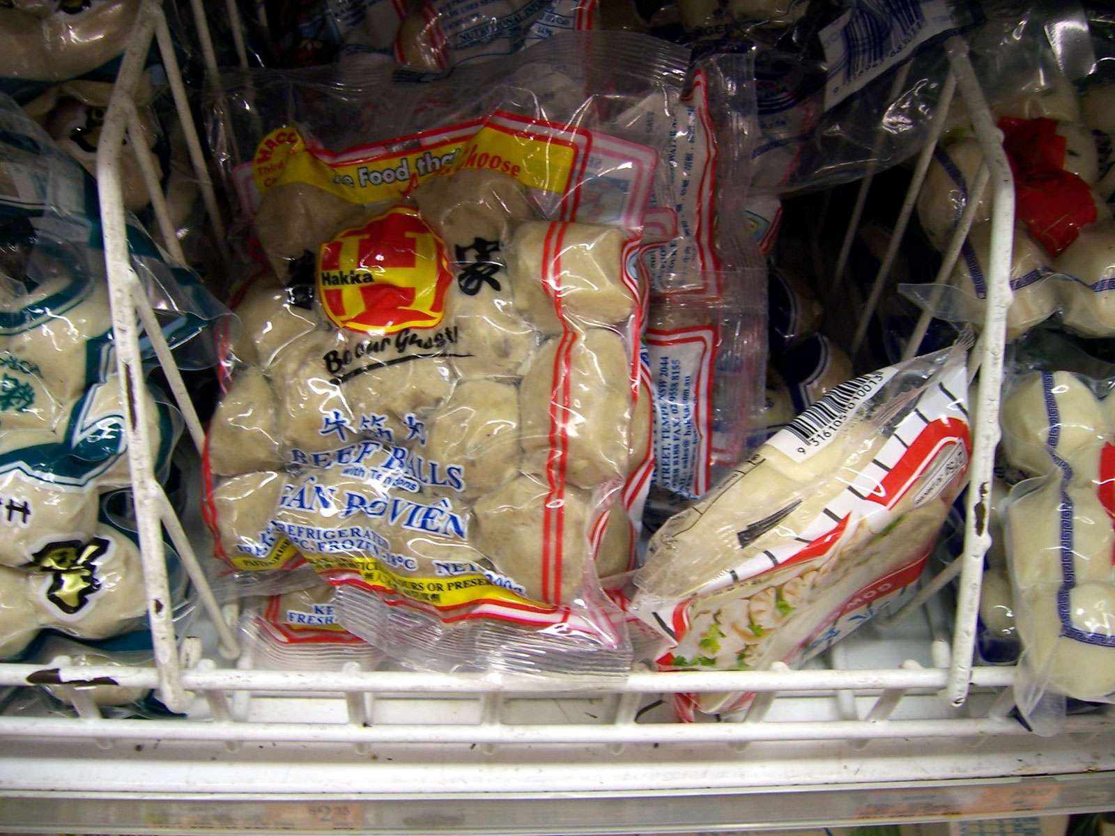 Un detalle de las albóndigas chinas A closeup of a packet of meatballs as sold by a Chinese supermarket in Sydney. Taken by Enoch Lau on 12 July 2006. As a courtesy, please let me know if you alter this image or this image description page. Original filename was 100_1607.JPG.